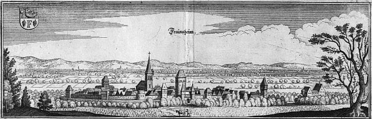 FRAINSHEIM - Kupferstich von Matthäus Merian